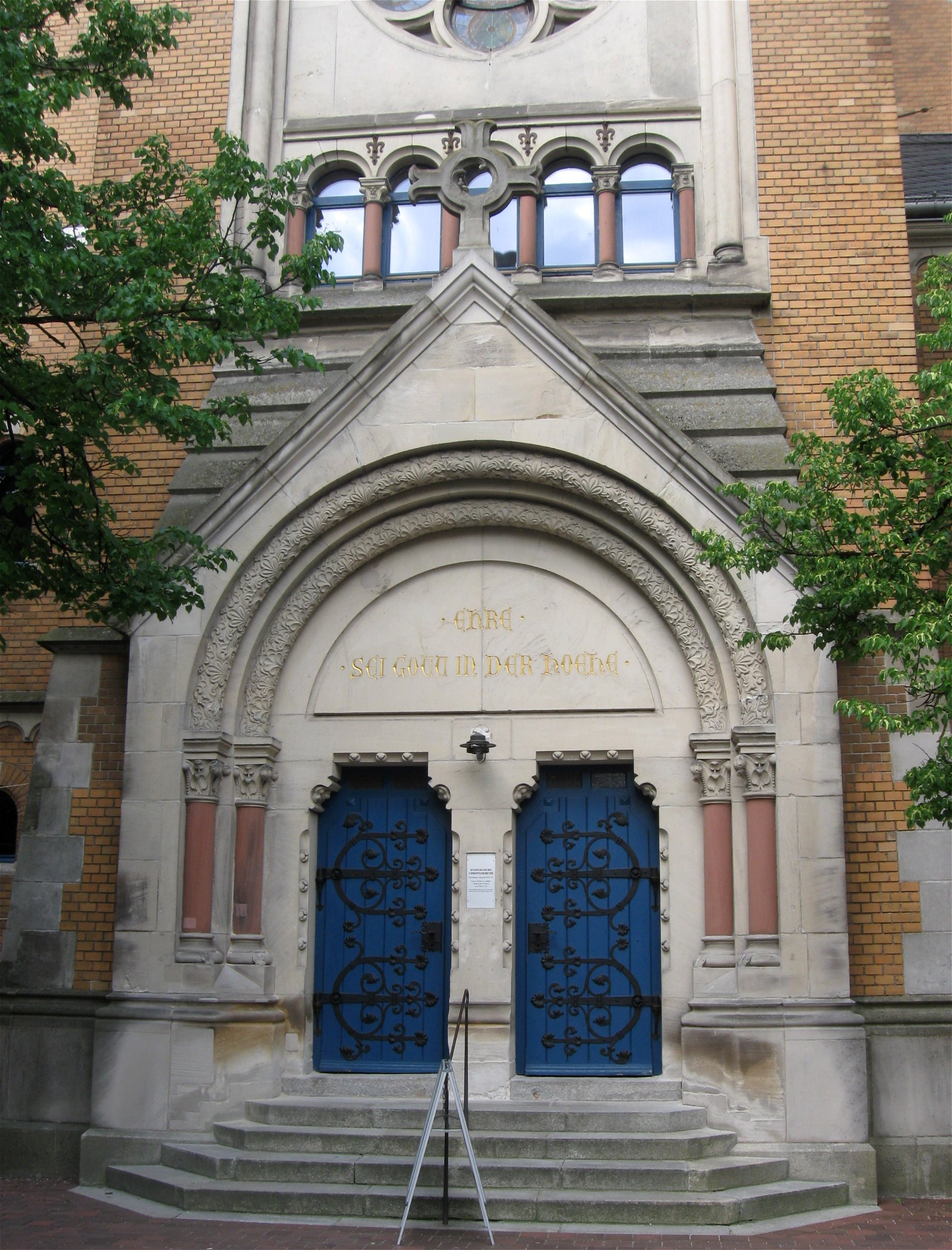 Martin-Luther-Platz 1; Evang.-Luth. Christuskirche, dreischiffiger neuromanischer Hallenbau, 1895-1897 nach Plänen von Karl Lemmes; mit Ausstattung. D-2-61-000-340